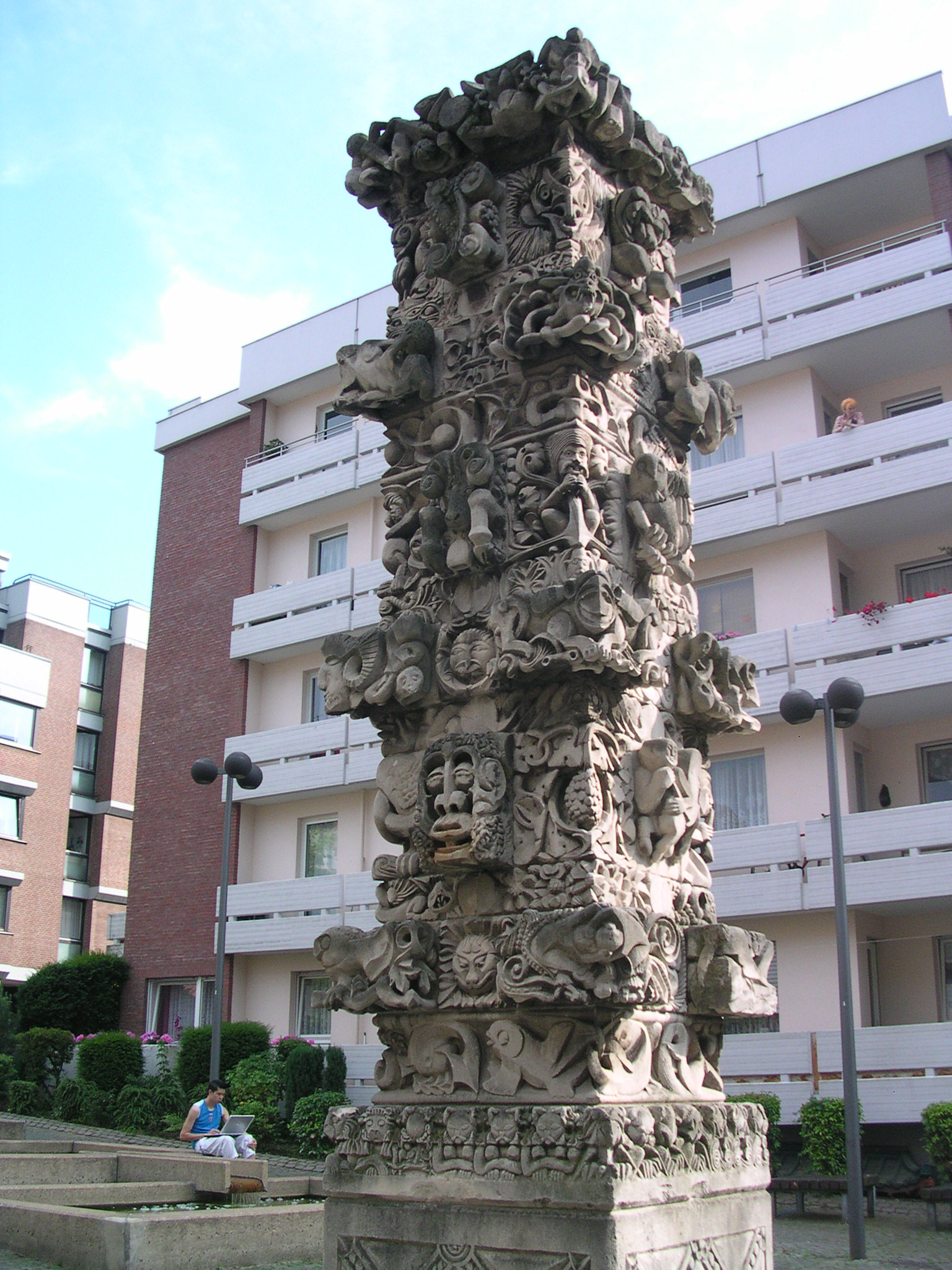 Aachen, Wohnhaus am Augustinerplatz